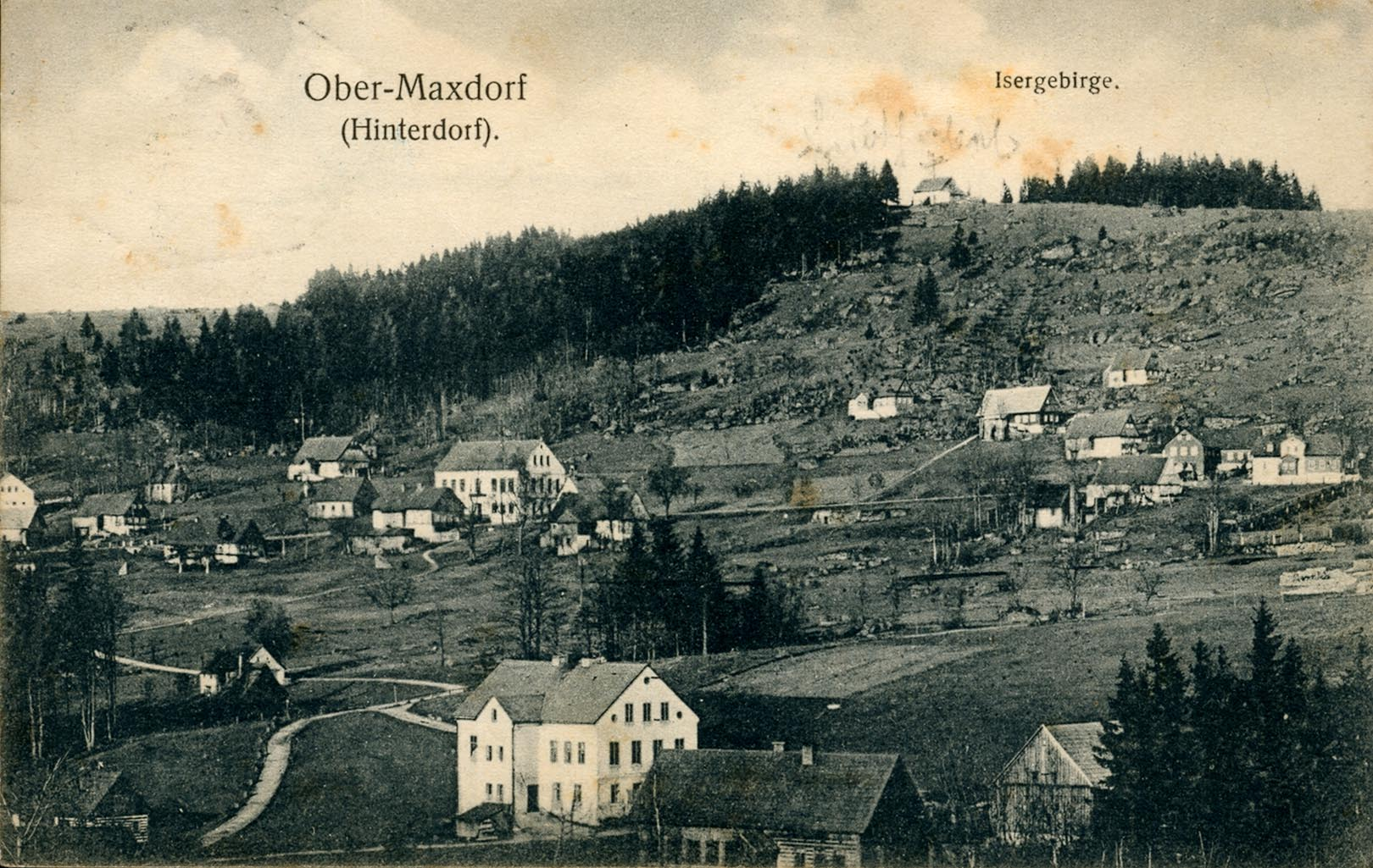 Sibthubel